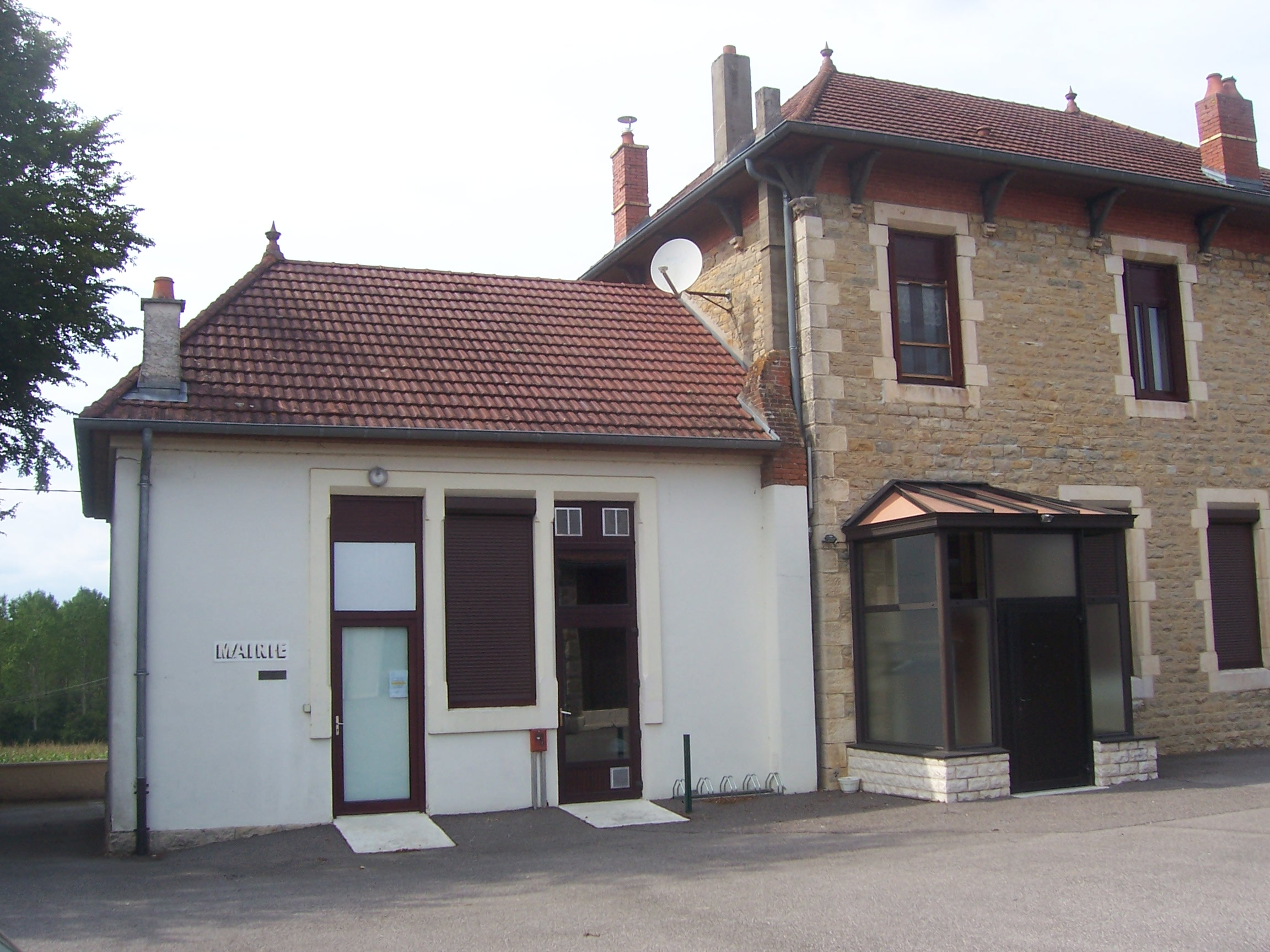 Mairie du Planois